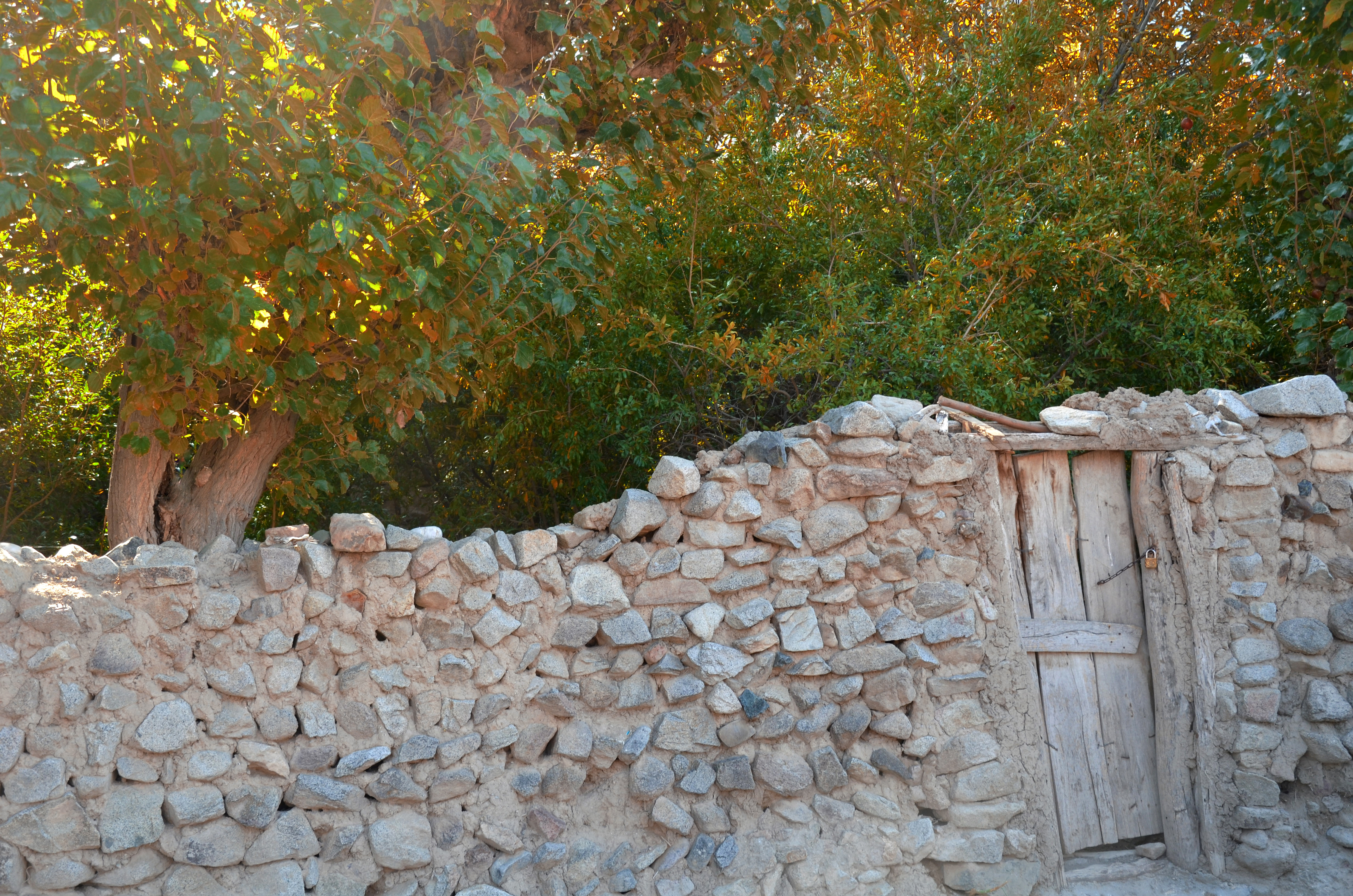 Kordasht